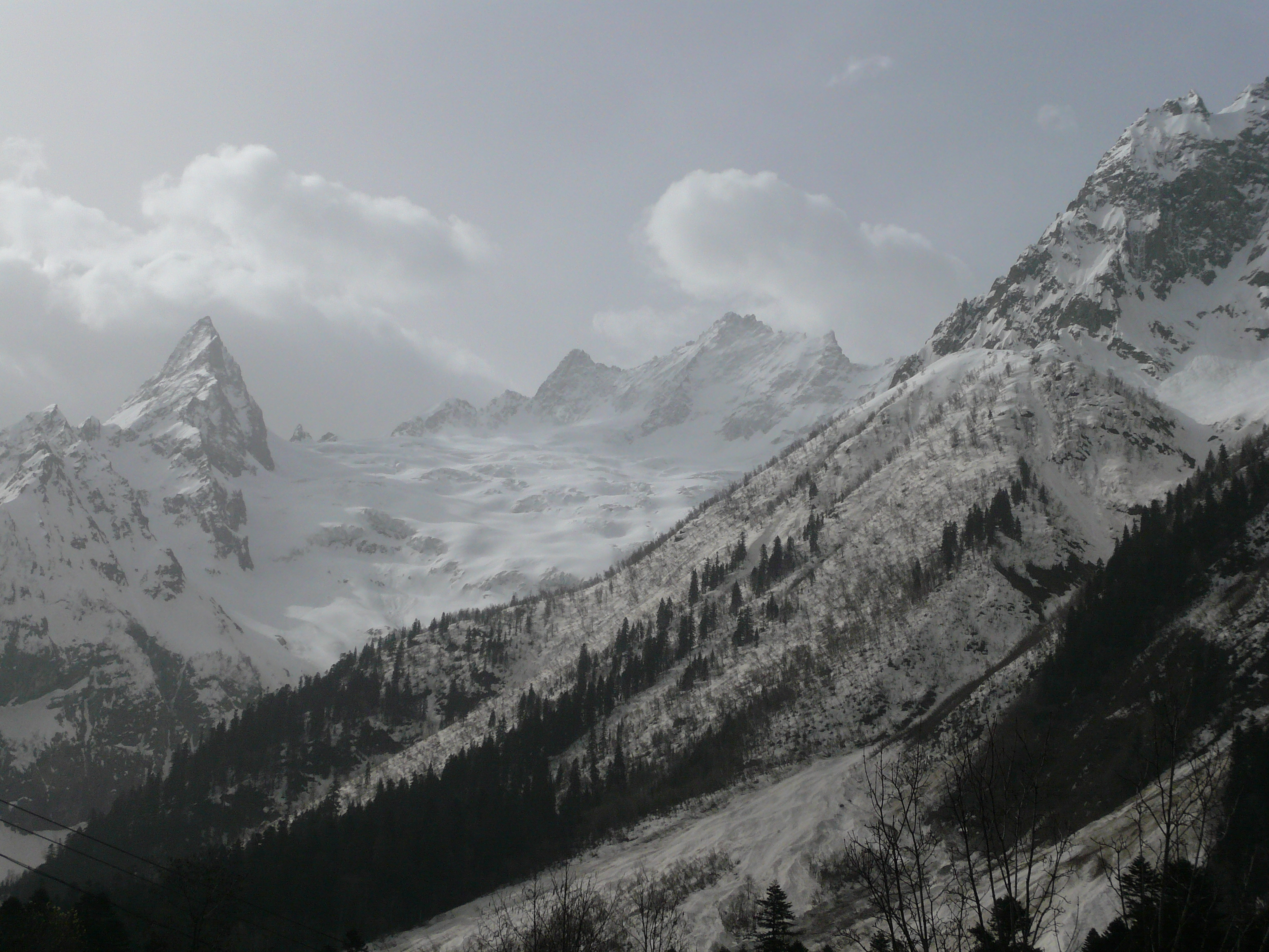 Домбай, 2008 год